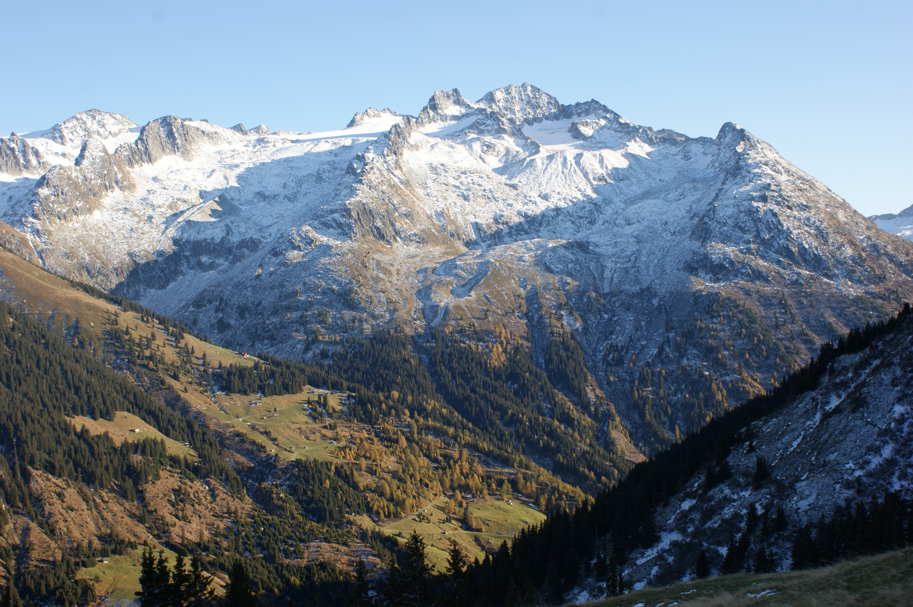 Val Medel und Blick auf den Piz Medel (3210 m, links), den drei Spitzen des Piz Uffiern (3151 m, Bildmitte) und Piz a Spescha (3109 m, rechts der Mitte)